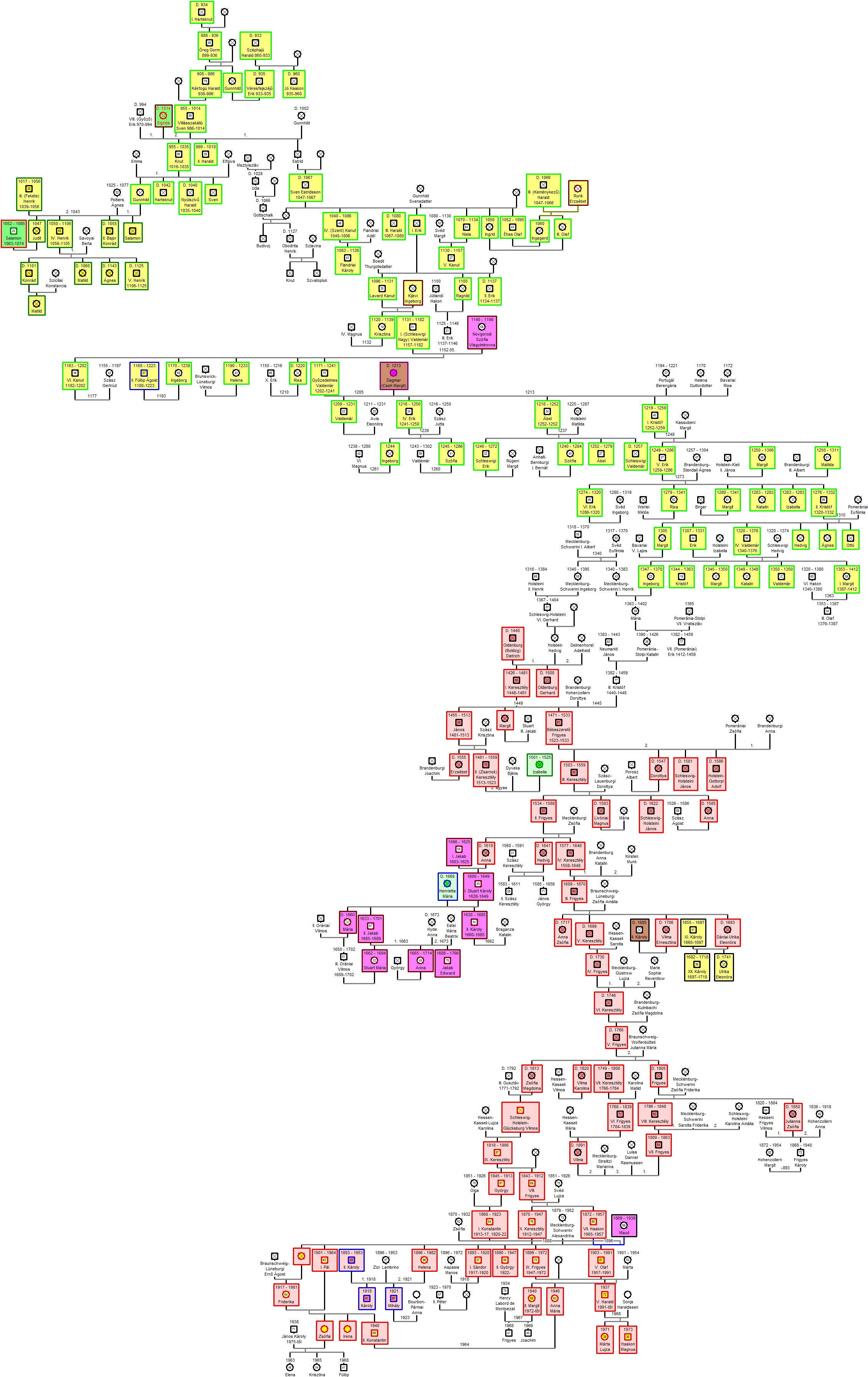 A dán uralkodóház családfája